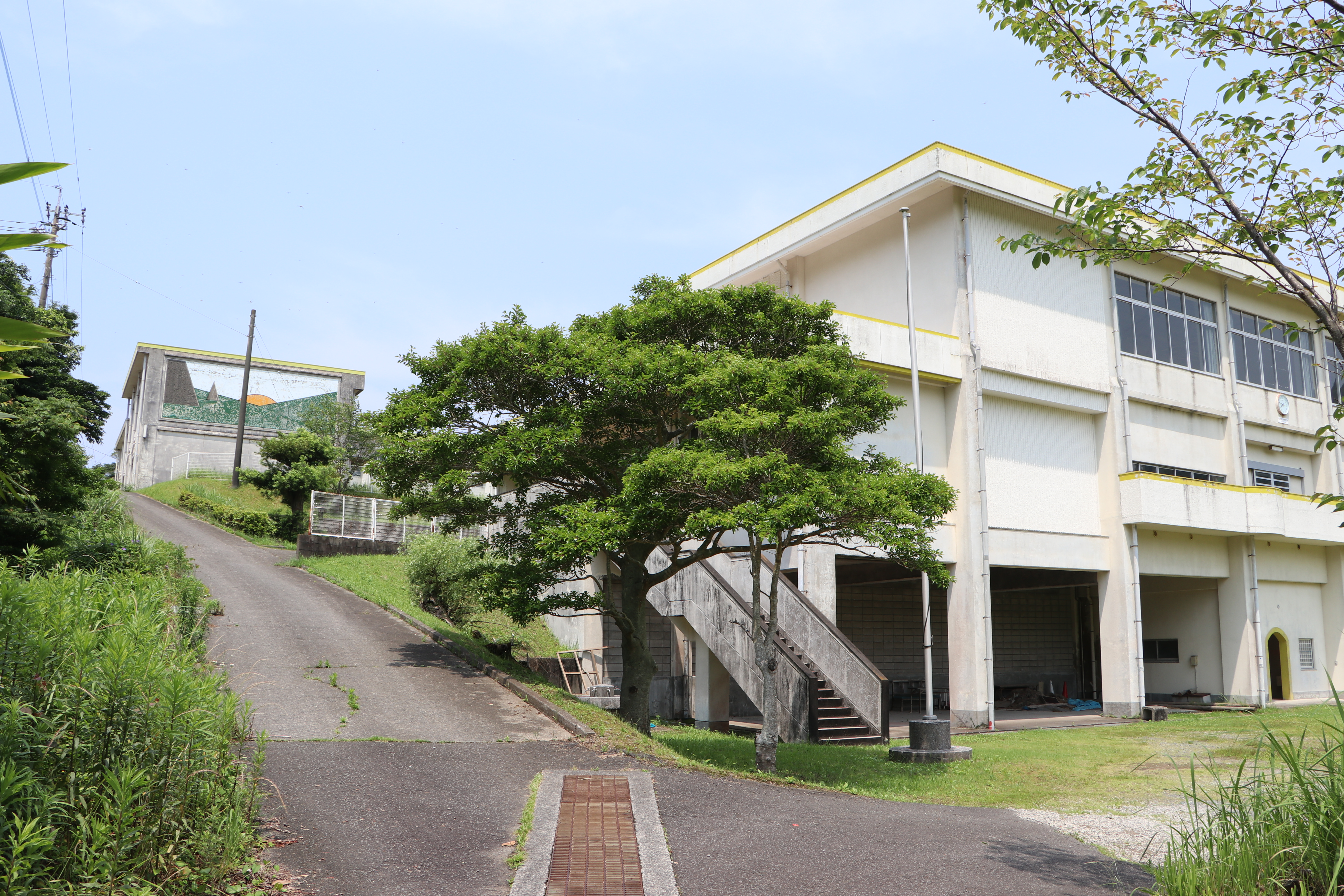 坊津町久志にある南さつま市立久志中学校跡地。 Canon EOS 80D